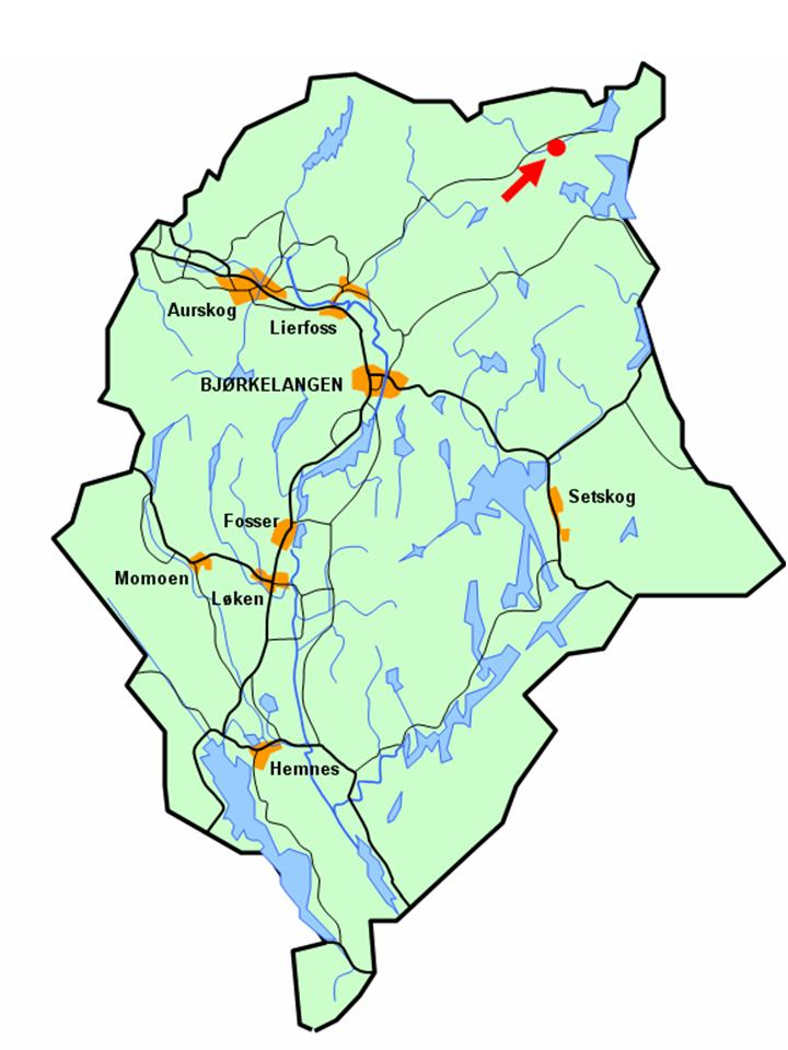 Stilisert kart som angir Dryulen sin lokalisering i Aurskog-Høland kommune.